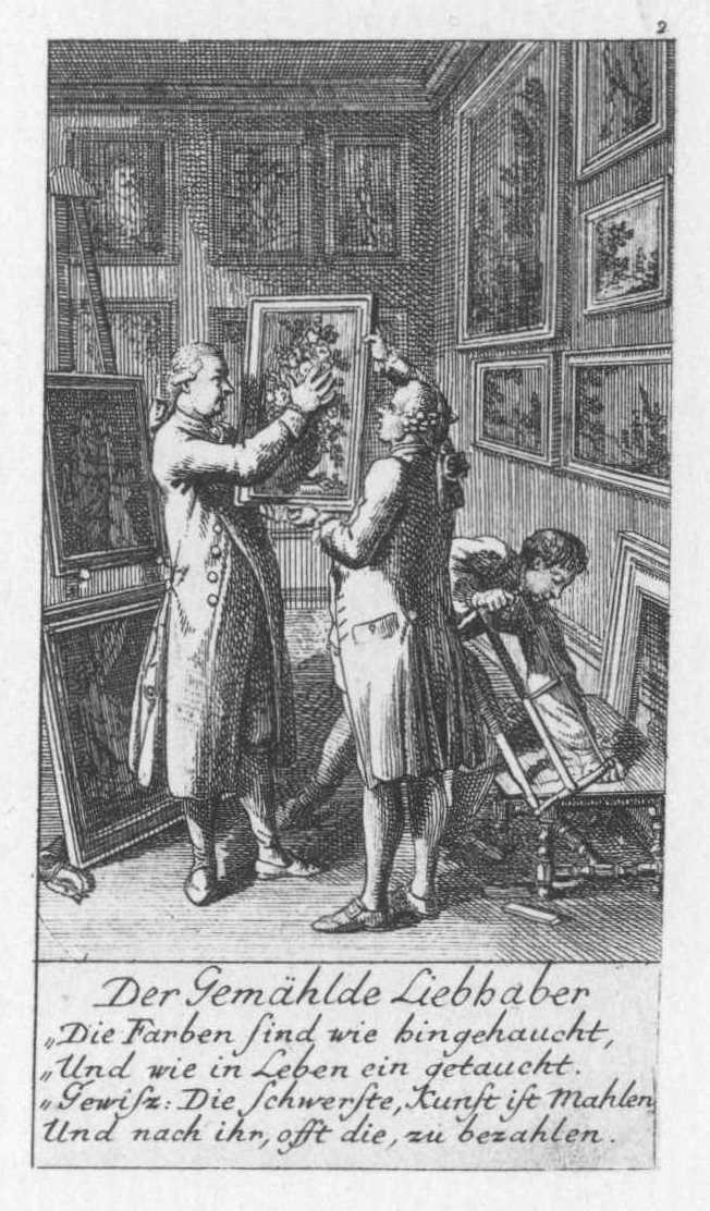 Zwölf Blätter Steckenpferdreiterei. (Beigaben zum Lauenburger genealog. Kalender. 1781). (Beschreibung lt. Quelle) Blatt 1 Blatt 2 Blatt 3 Blatt 4 Blatt 5 Blatt 6 Blatt 7 Blatt 8 Blatt 9 Blatt 10 Blatt 11 Blatt 12 der Serie